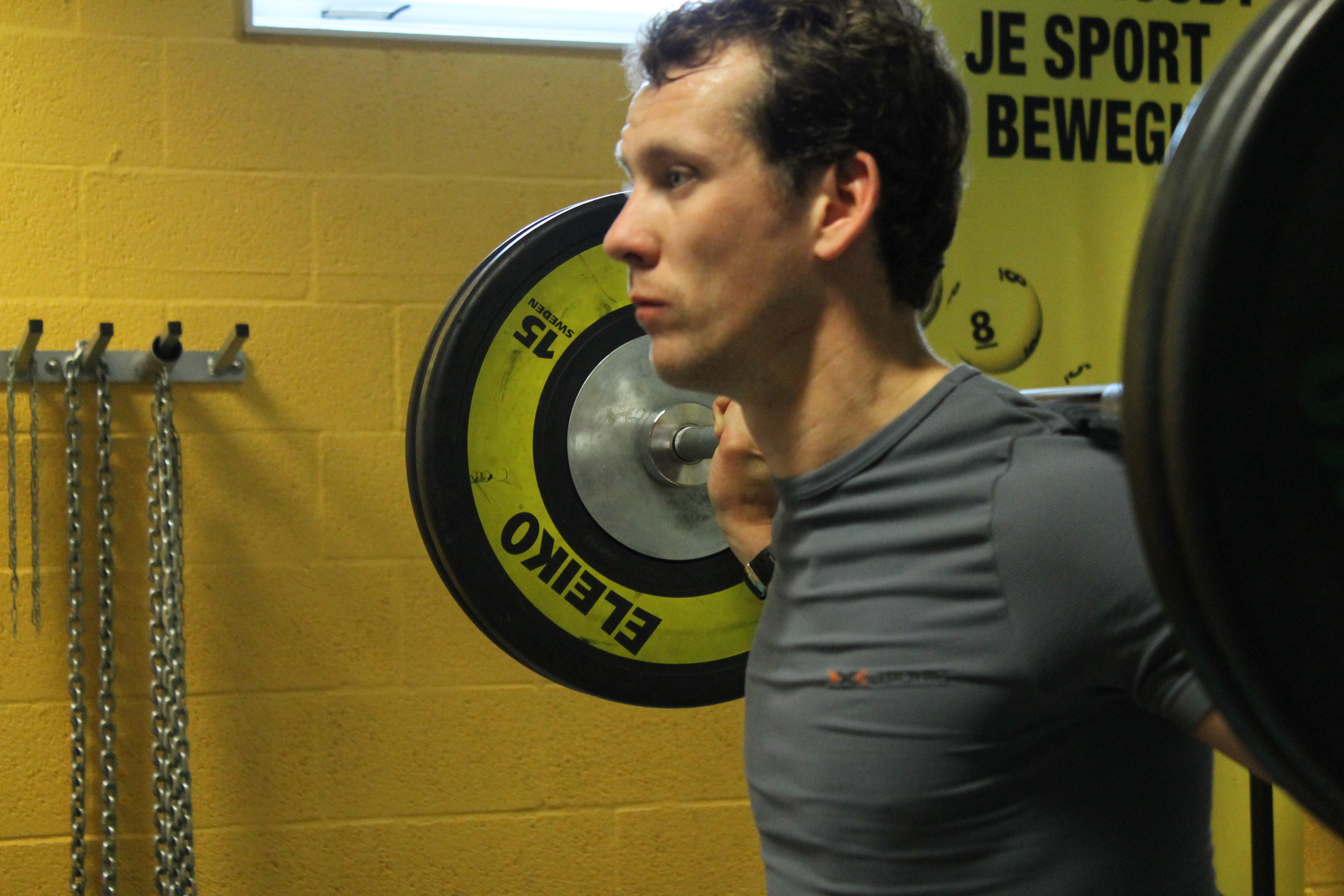 Stefan Groothuis tijdens de krachttraining